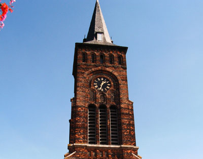 Toren Sint-Jan Baptistkerk in Wiekevorst